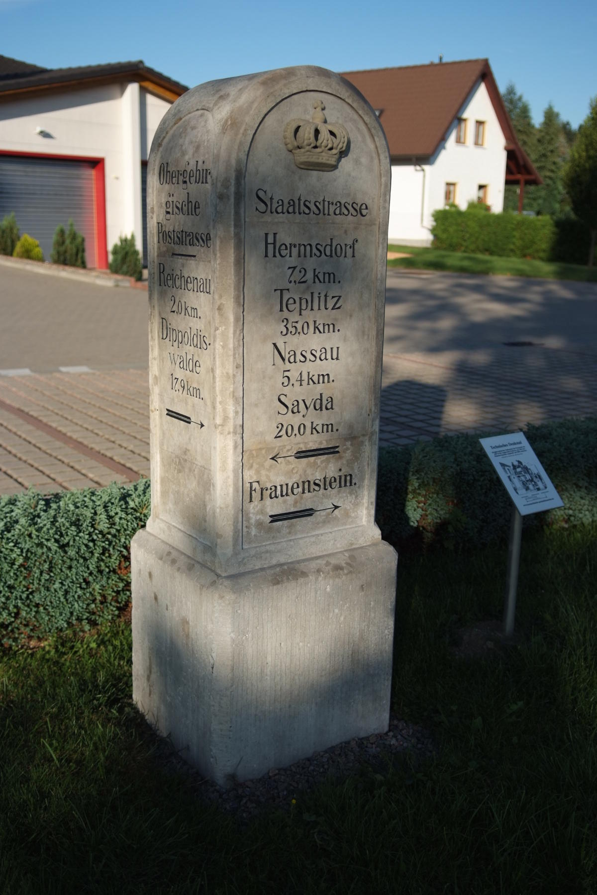 kgl.-sächs. Meilenstein in Frauenstein an der B171